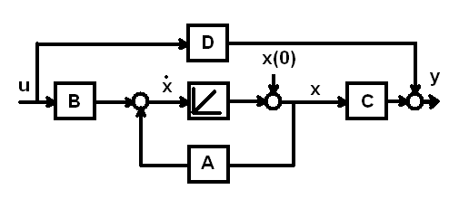 block diagram state space